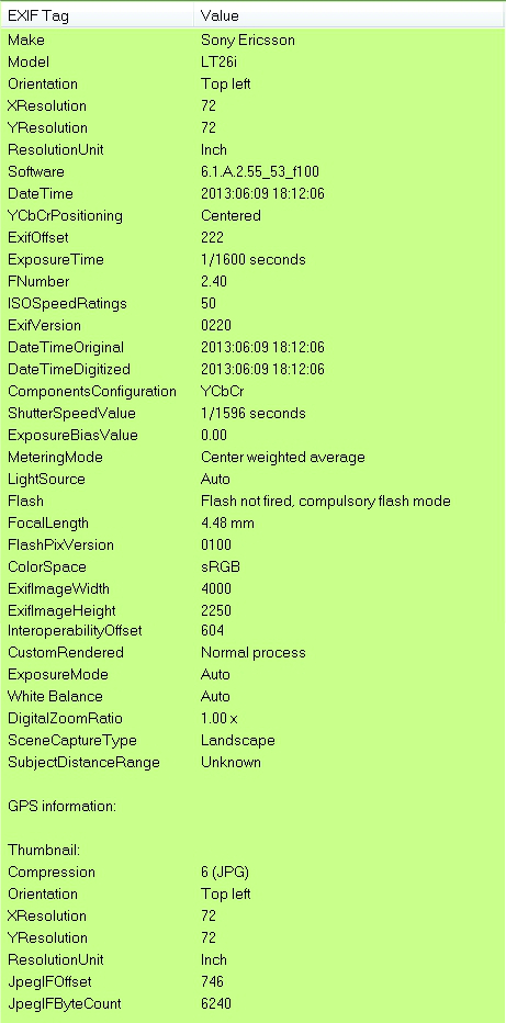 JPG Metadata